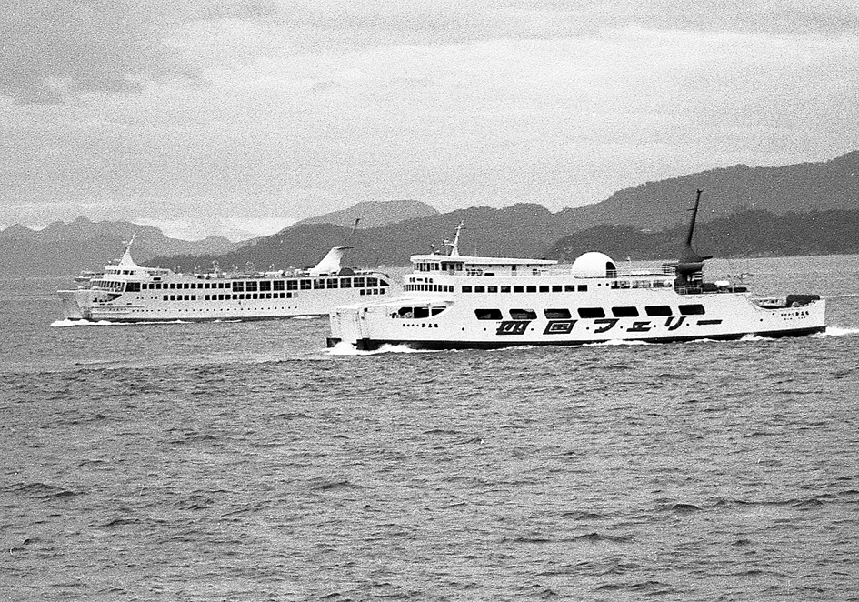 四国フェリー 第78玉高丸